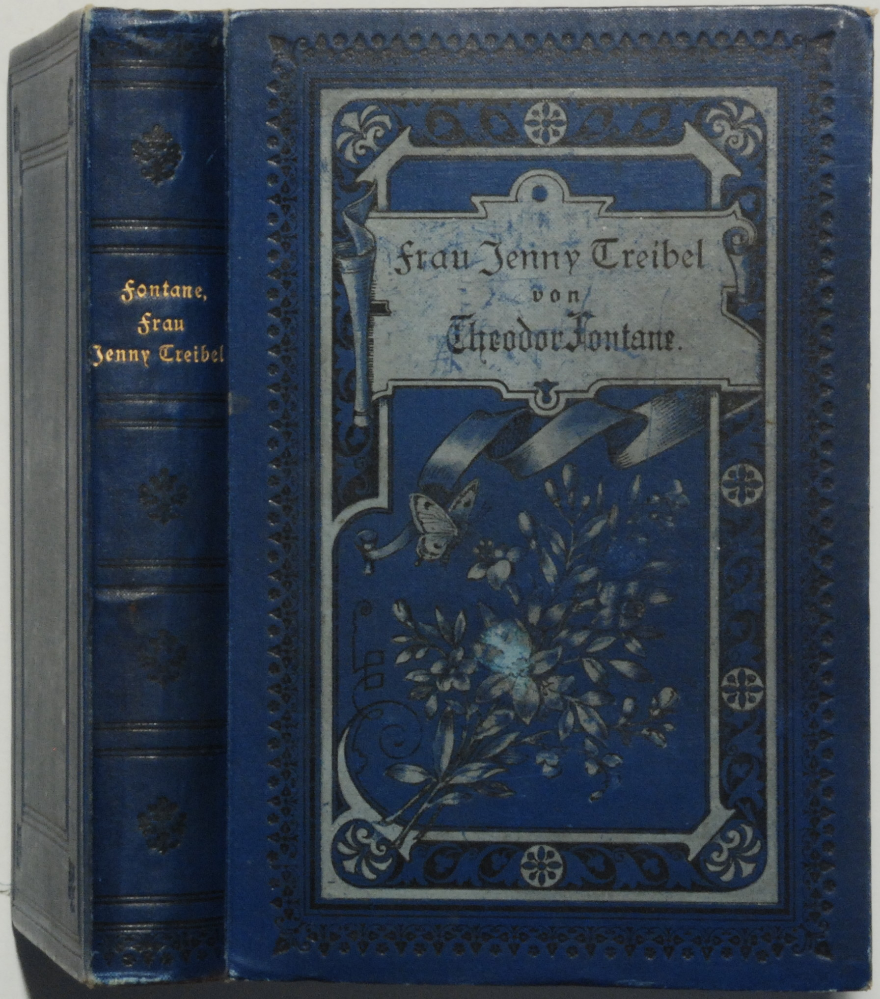 Fontane, Theodor: Frau Jenny Treibel oder "Wo sich Herz zum Herzen find' t". Roman. Berlin: F. Fontane & Co. 1893, 336 Seiten mit Druckvermerk "G. Pätz in Naumburg a. S." auf letzter Seite + 4 Seiten Verlagsanzeigen; Erstausgabe (Wilpert/Gühring² 38). Original-Leinen 8°(189 x 124 mm). Vorderer Buchdeckel mit umlaufender Schwarzprägung (Efeu-Motiv) und Historismus-Rahmen, darin Titelschild, zwei Blütenzweige und ein Schmetterling. Rücken-Quertitel in Gold; schwarzgeprägte Fleurons als Rückenschmuck; Hinterdeckel gerahmt in Blindprägung; Vorsätze und Spiegel mit Blumen-Motiv gemustert. Der Ende 1892 ausgelieferte Roman gewann schnell die Gunst von Publikum und Kritik. Er hat sie bis heute ohne erkennbare Einschränkung bewahrt. Mit scheinbar nur halbem Ernst wird dem Leser eine Geschichte vorgeplaudert, - nach dem Muster einer Komödie. Es geht um Besitz und das mit ihm verbundene gesellschaftliche Ansehen; um Bildung versus Besitz; um Poesie und falsche Gefühle (Wikipedia, Stand 06.11.2007). Thematik und Fontanes "Kunst der Unterreibung" (H. Nürnberger 1997) bewahren dem "Berlin-Roman" Zeitlosigkeit und Modernität.